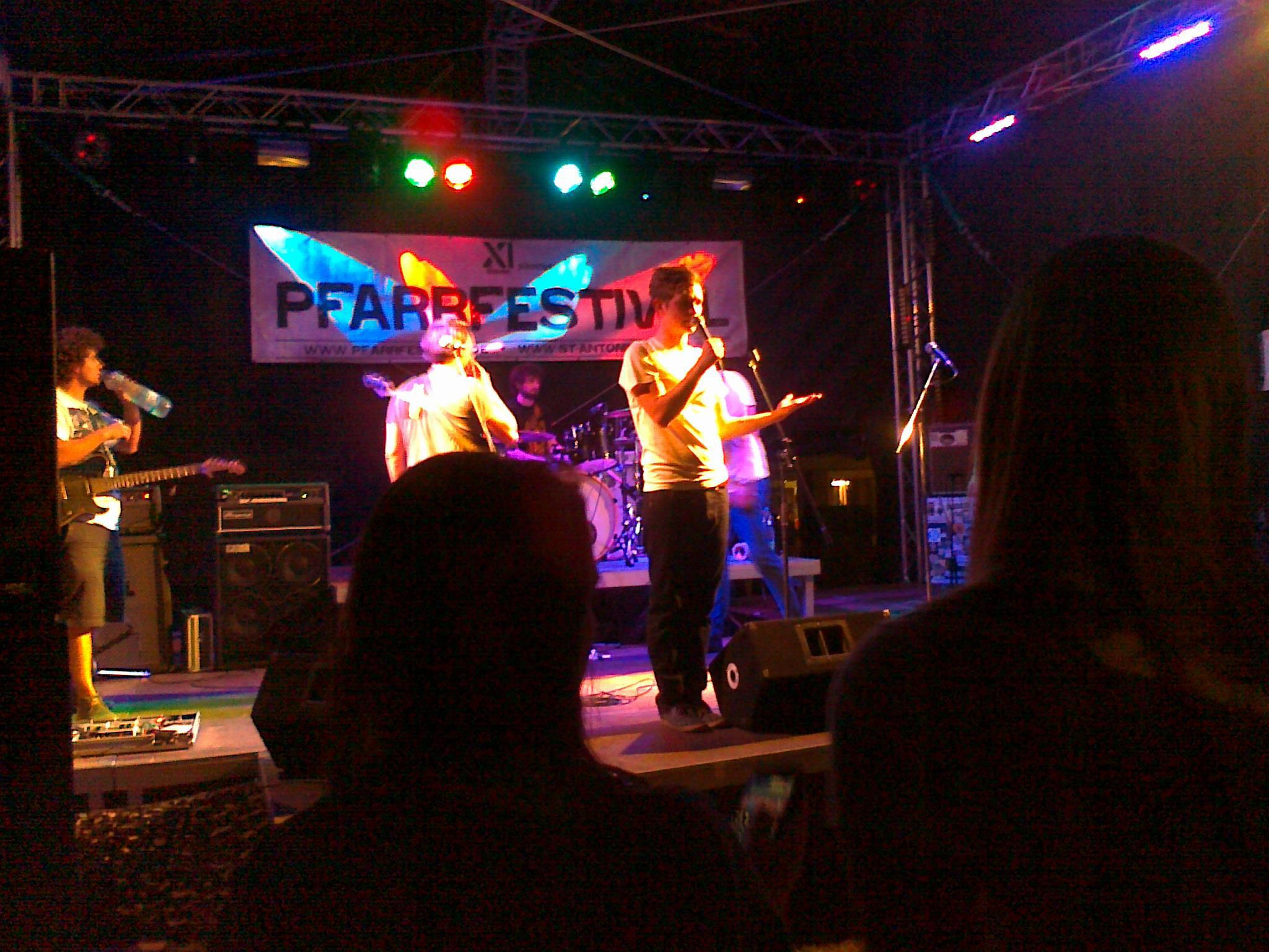 City Light Thiefs Auftritt beim Pfarrfestival 2012 in Essen